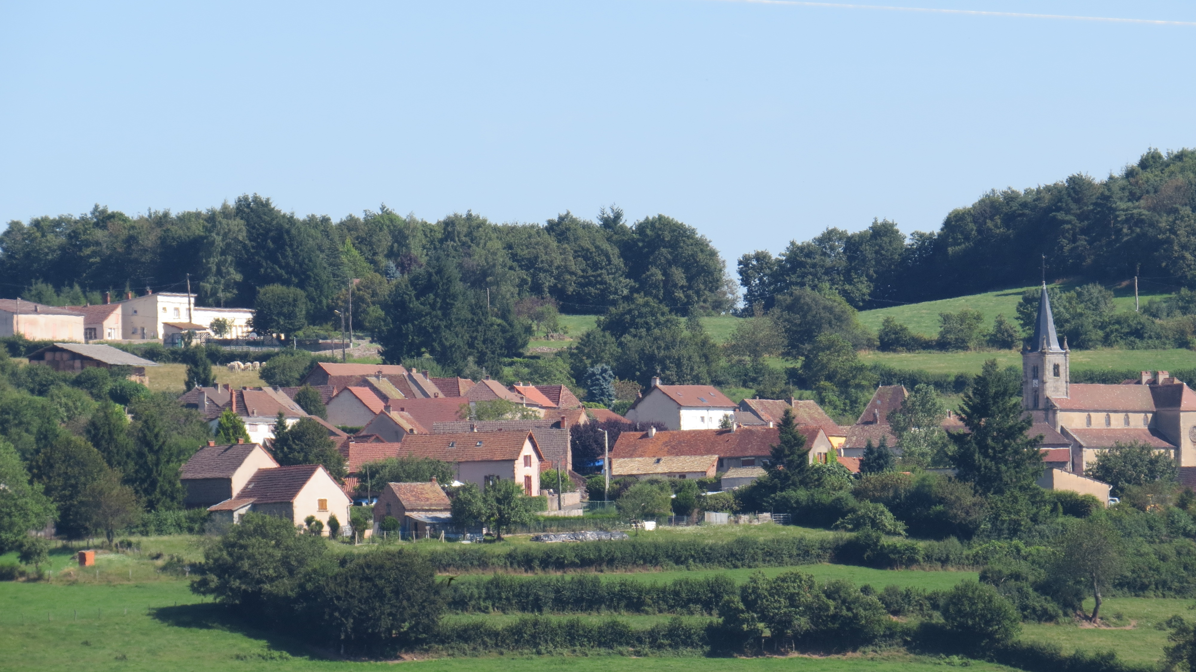 Village de Beaubery en Saône et Loire, Bourgogne